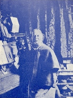 Remy de Gourmont est un écrivain français né au manoir de la Motte à Bazoches-au-Houlme près d'Argentan (Orne) le 4 avril 1858 et mort à Paris le 17 septembre 1915.